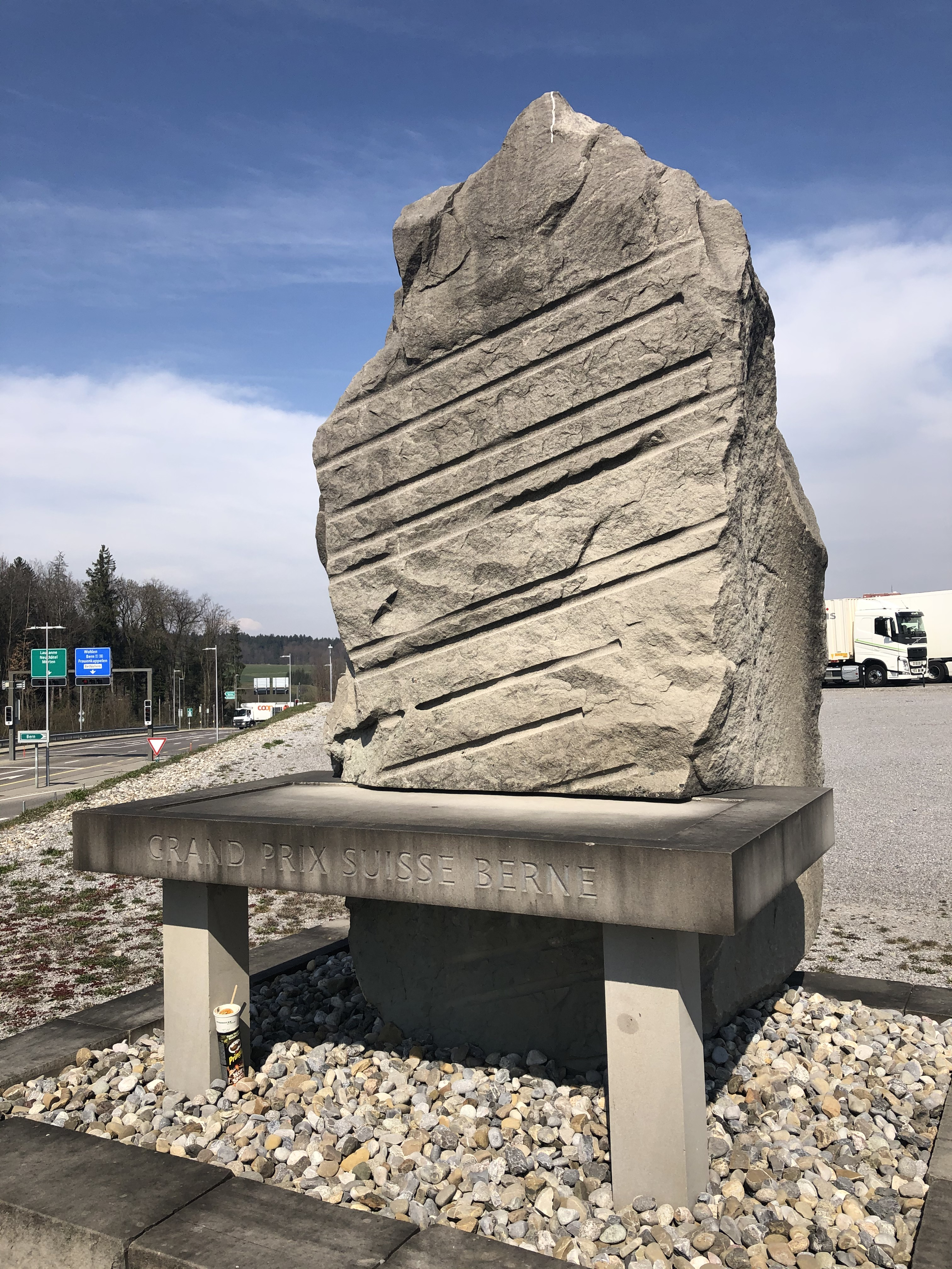 Gedenkstein an die ehemalige Formel-1 Rennstrecke Bern